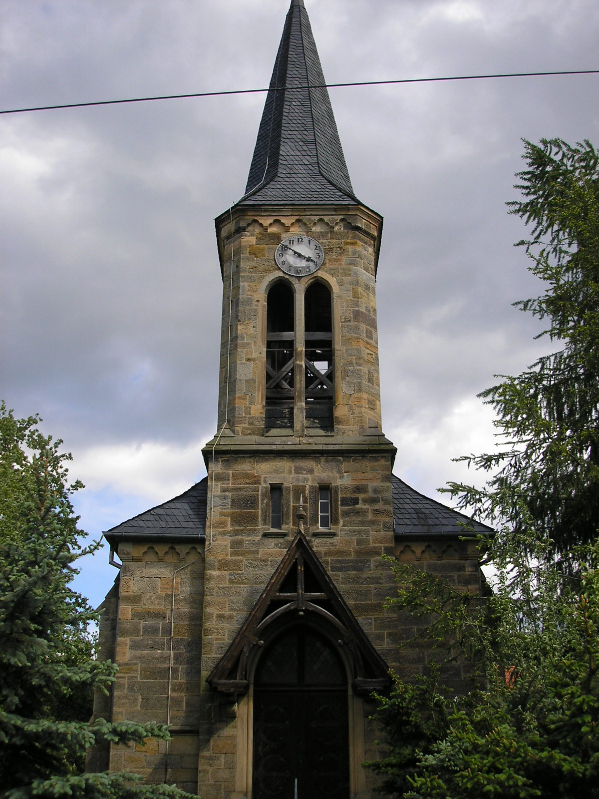 Kirche von Dörnfeld an der Ilm (Ilm-Kreis, Thüringen).